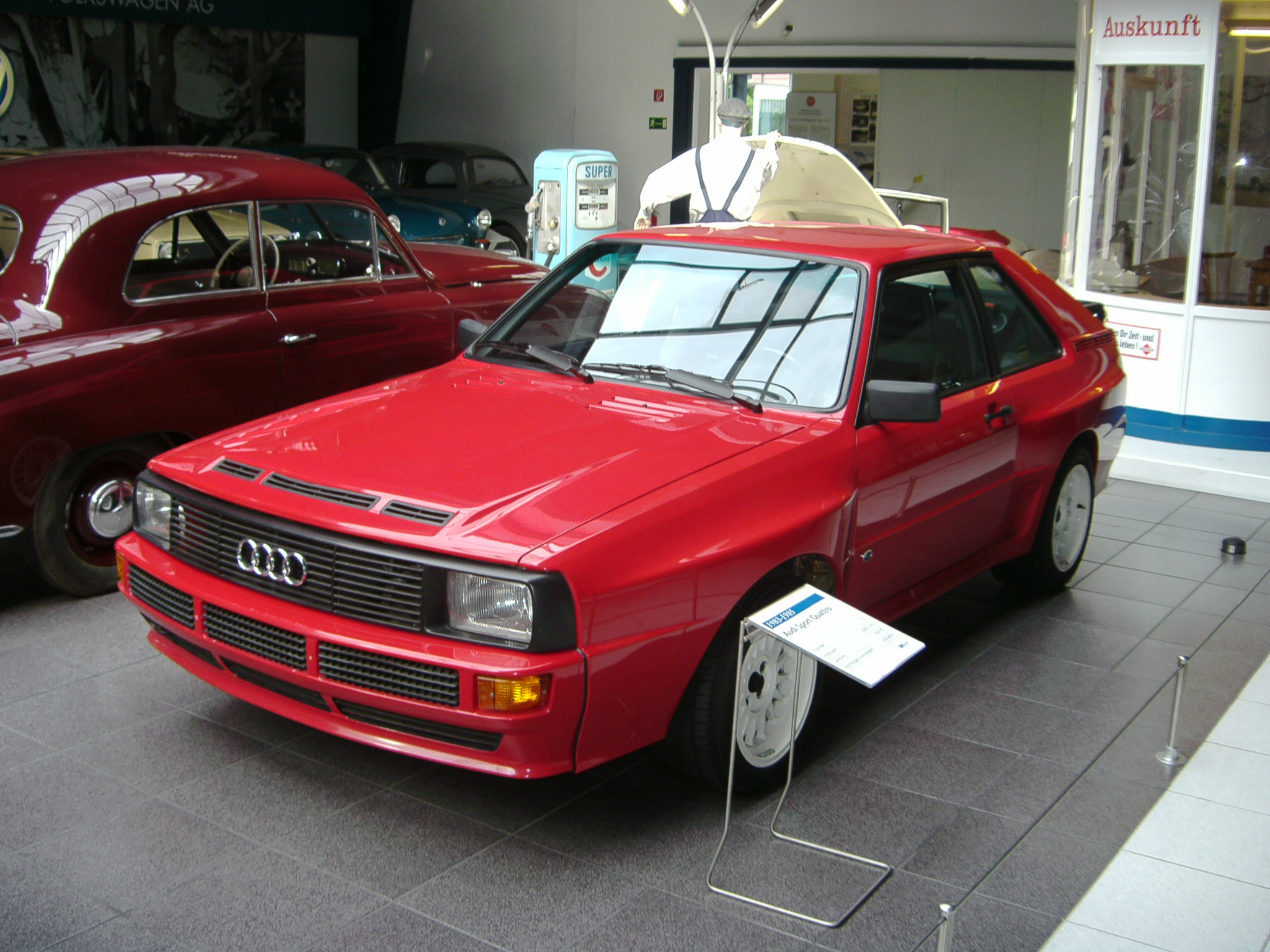 Der Audi quattro, auch Urquattro genannt, ist ein Sportcoupé der Marke Audi, das zwischen Frühjahr 1980 und Mitte 1991 hergestellt wurde. Mit 11.452 gebauten Einheiten war er das erste in größeren Stückzahlen produzierte Straßenfahrzeug mit einem permanenten Allradantrieb und maßgeblich für die Erfolgsgeschichte des quattro-Antriebs von Audi sowie für den Einsatz des permanenten Allradantriebs in Straßenfahrzeugen generell verantwortlich. Zwar wurden Mitte der 1960er-Jahre bereits einige Straßenfahrzeuge mit einem permanenten Allradantrieb von Ferguson ausgestattet, jedoch mit mäßigem Erfolg. Dazu gehörten der Jensen FF, von dem lediglich 320 Fahrzeuge produziert wurden, sowie der Ford Zephyr mit Ferguson-Allradantrieb, von dem versuchsweise 22 Fahrzeuge für die britische Polizei gefertigt wurden. Aufgrund der hohen Produktionskosten wurde letztgenanntes Projekt nicht weiter verfolgt. Die Produktion des Jensen FF wurde 1971 aufgrund mangelnder Vermarktungsmöglichkeiten ebenfalls eingestellt. 1972 brachte Subaru mit dem Modell Leone ein allradangetriebenes Straßenfahrzeug auf den Markt, welches allerdings lediglich mit einem zuschaltbaren Allradantrieb ausgestattet war. Bereits 1983 wurde die quattro GmbH gegründet, ferner war der permanente Allradantrieb optional für immer mehr Audi-Fahrzeuge verfügbar. Audi selbst bezeichnet das Modell Audi Coupé S2 als den offiziellen Nachfolger des Urquattro. Das Wort quattro (ital. für vier) wird immer durchgehend in Kleinbuchstaben geschrieben. Auch das Original-quattro-Logo zeigt ausschließlich Minuskeln. Quelle: Jährlich machen auch verschiedene Oldtimerclubs und Ralleys Station im Sporthotel Achental und genießen die Vielfältigkeit der Touren durch den Chiemgau.